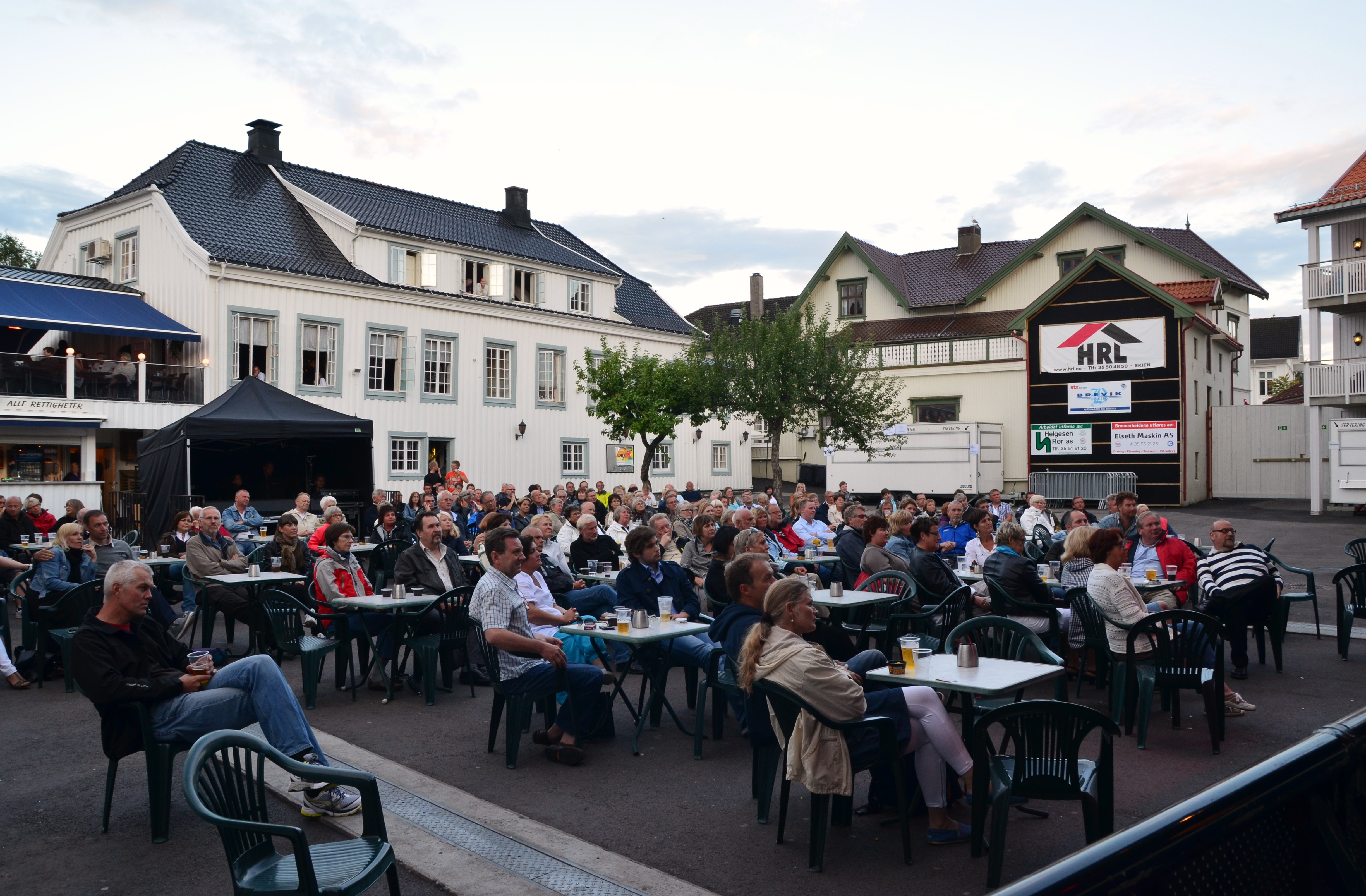 Wrightegaarden er en bygning som ligger i Langesund og er fra tidlig på 1800-tallet. Bygningen fungerer som konsertscene og kulturhus.